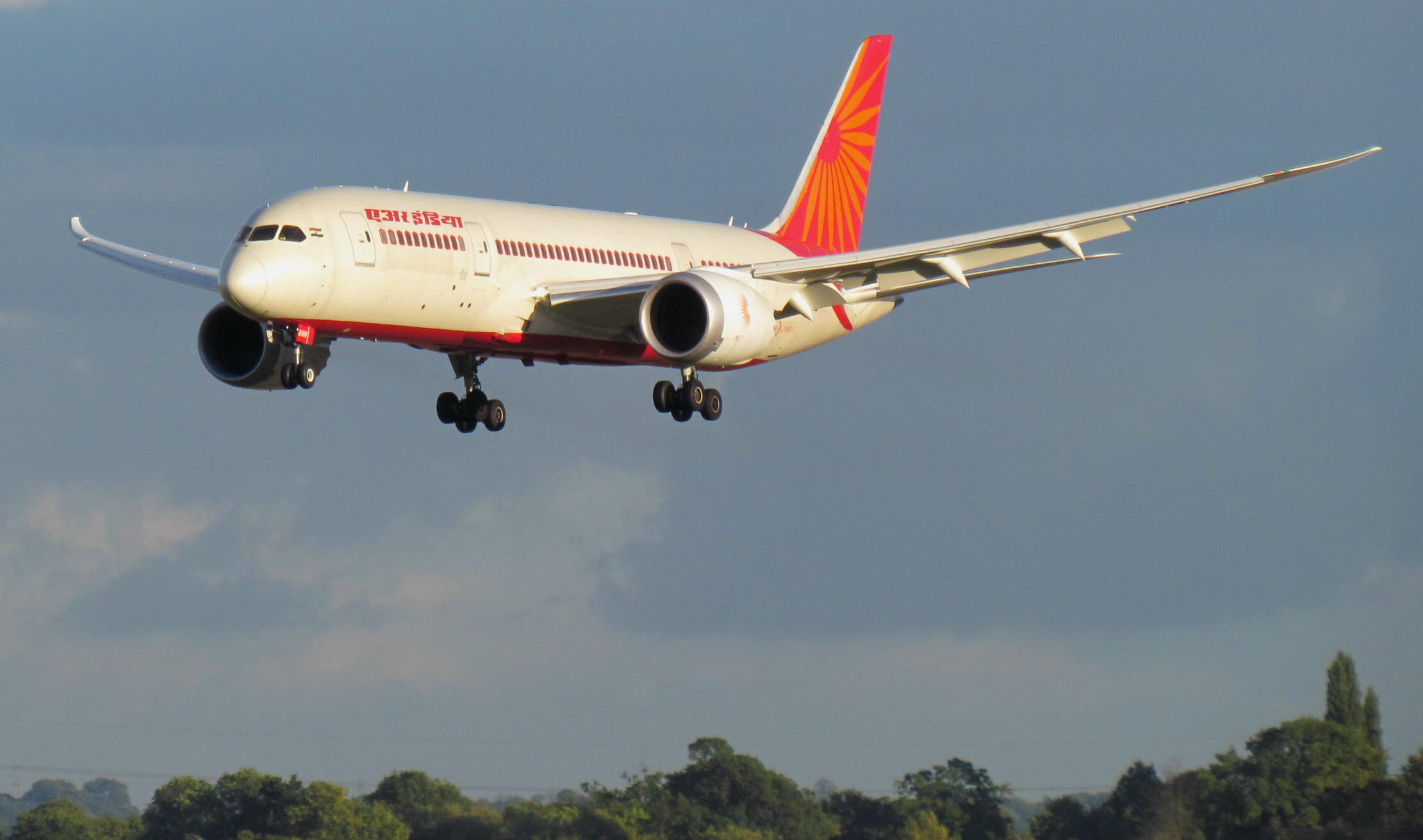 Air India B787